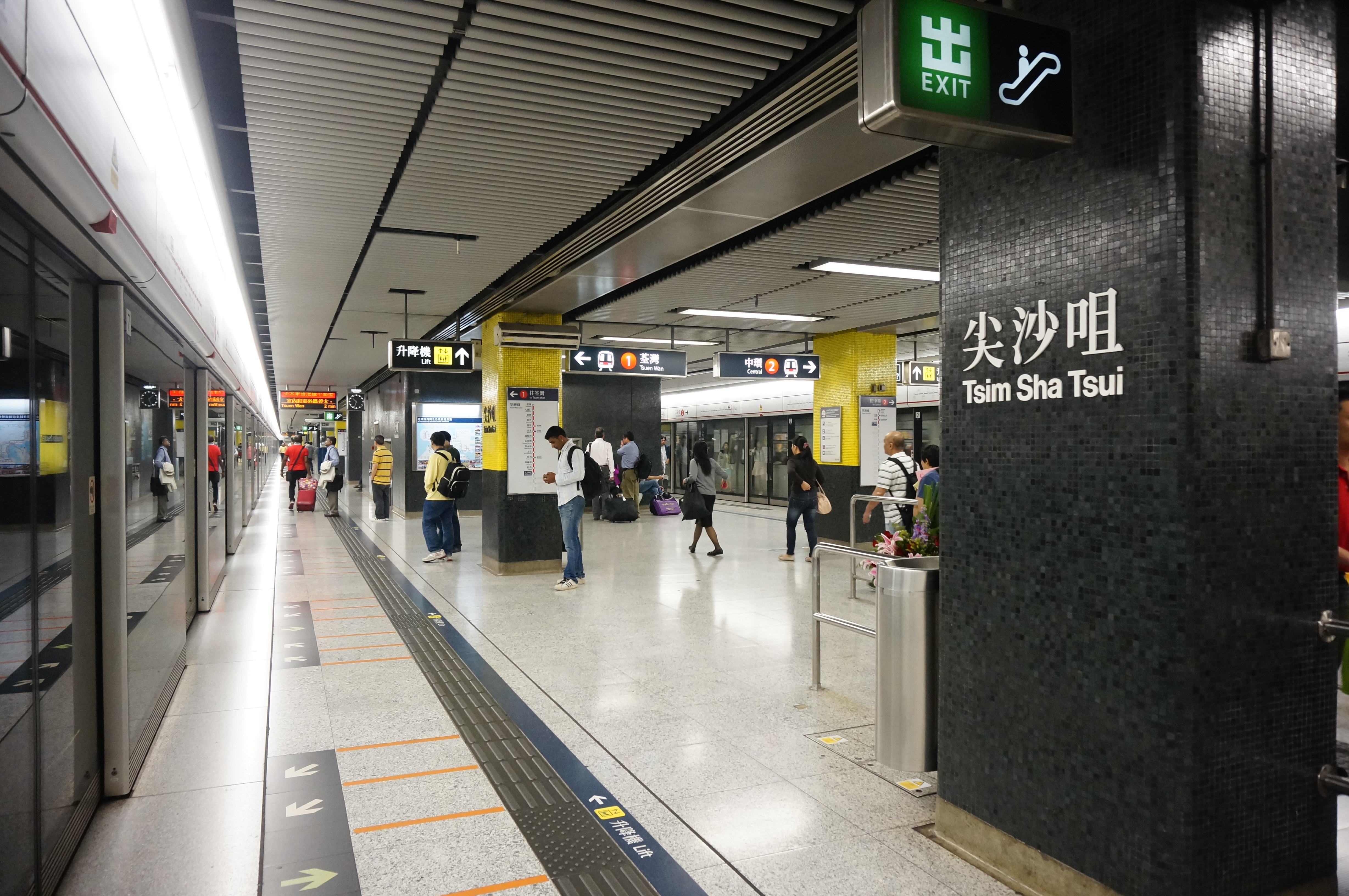 港鐵尖沙咀站月台